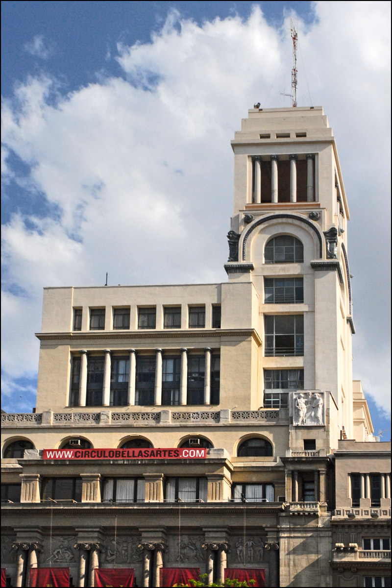 Le Circulo de Bellas Artes est un centre culturel multidisciplinaire indépendant. Il posséde un cinéma, des salles de spectacles et d'expositions, une cafeteria, une bibliothèque. Il a été ouvert en 1880. Le bâtiment actuel a été conçu dans un style inspiré en partie de l'art déco par l'architecte Antonio Palacios Ramilo, un des grands architectes de Madrid (il est l'auteur du palais de la communication) et construit en 1926.